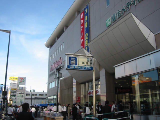 撮影場所:札幌市福住駅 撮影日:2007年7月18日 撮影者:モンモン